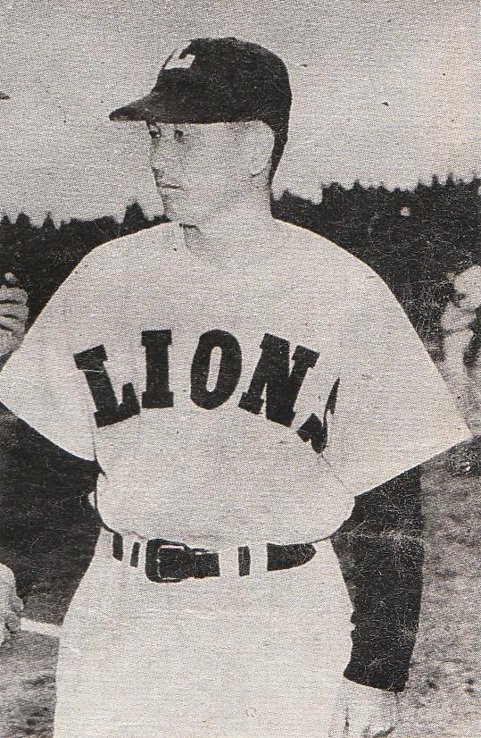 1951年頃の、三原脩（年代は、『プロ野球ユニフォーム物語』を参考に記述）。